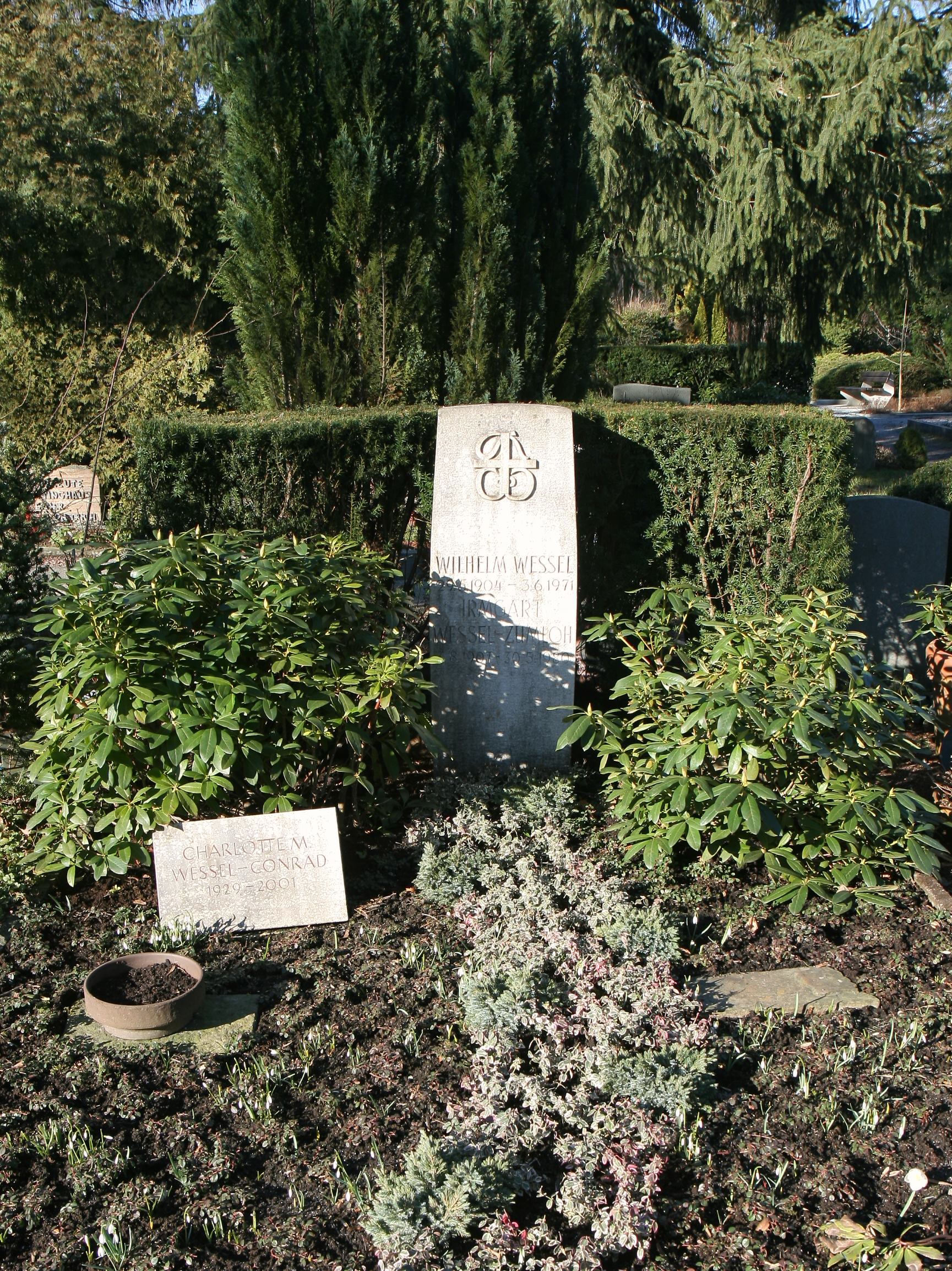 Grabstätte von Wilhelm Wessel und Irmgard Wessel-Zumloh auf dem Hauptfriedhof in Iserlohn.